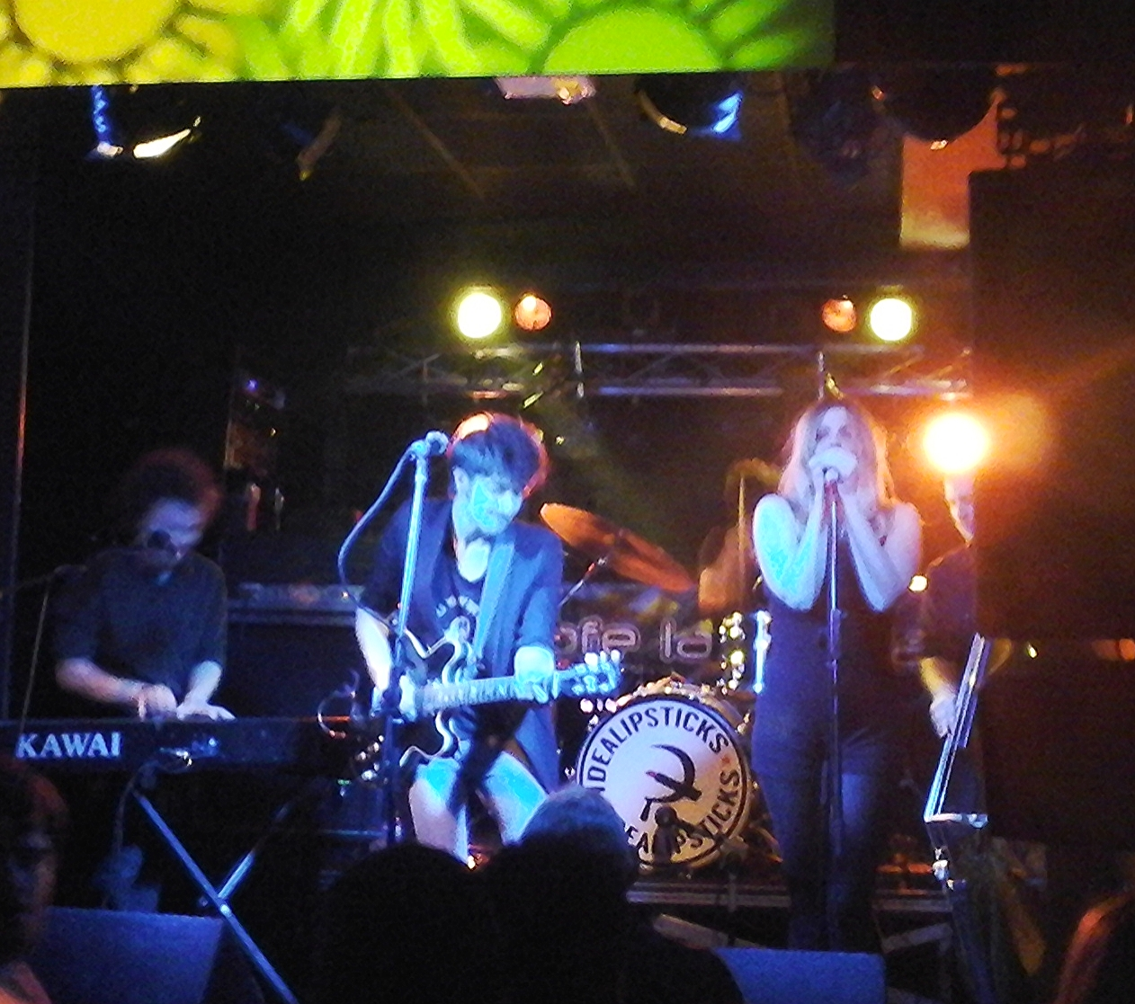 Idealipsticks en el "Café la Palma" (Madrid, 19-marzo-2016)